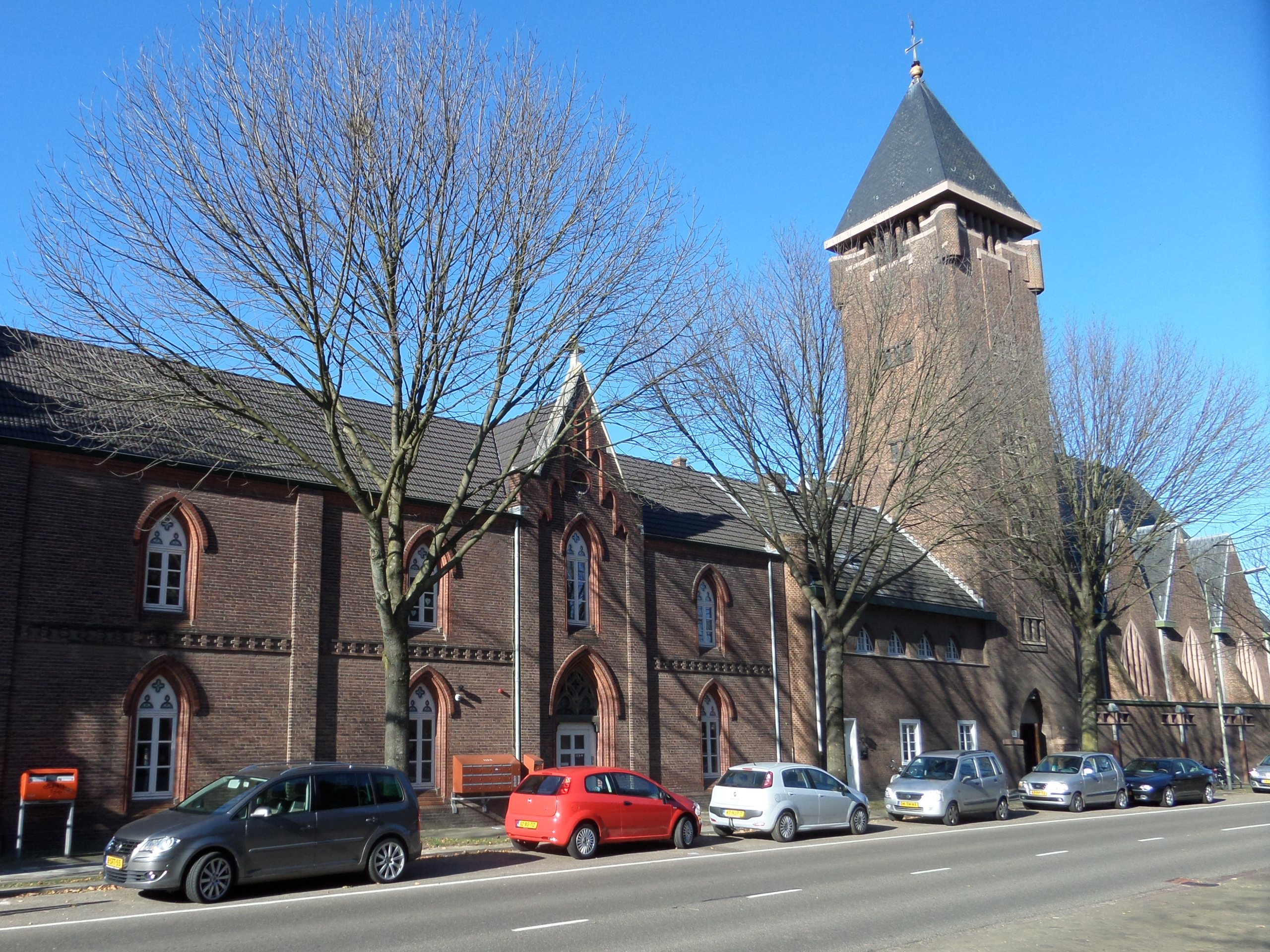 Christus Koningkerk en voormalig klooster van de Missionarissen van het H.Hart in de Sittardse wijk Leyenbroek